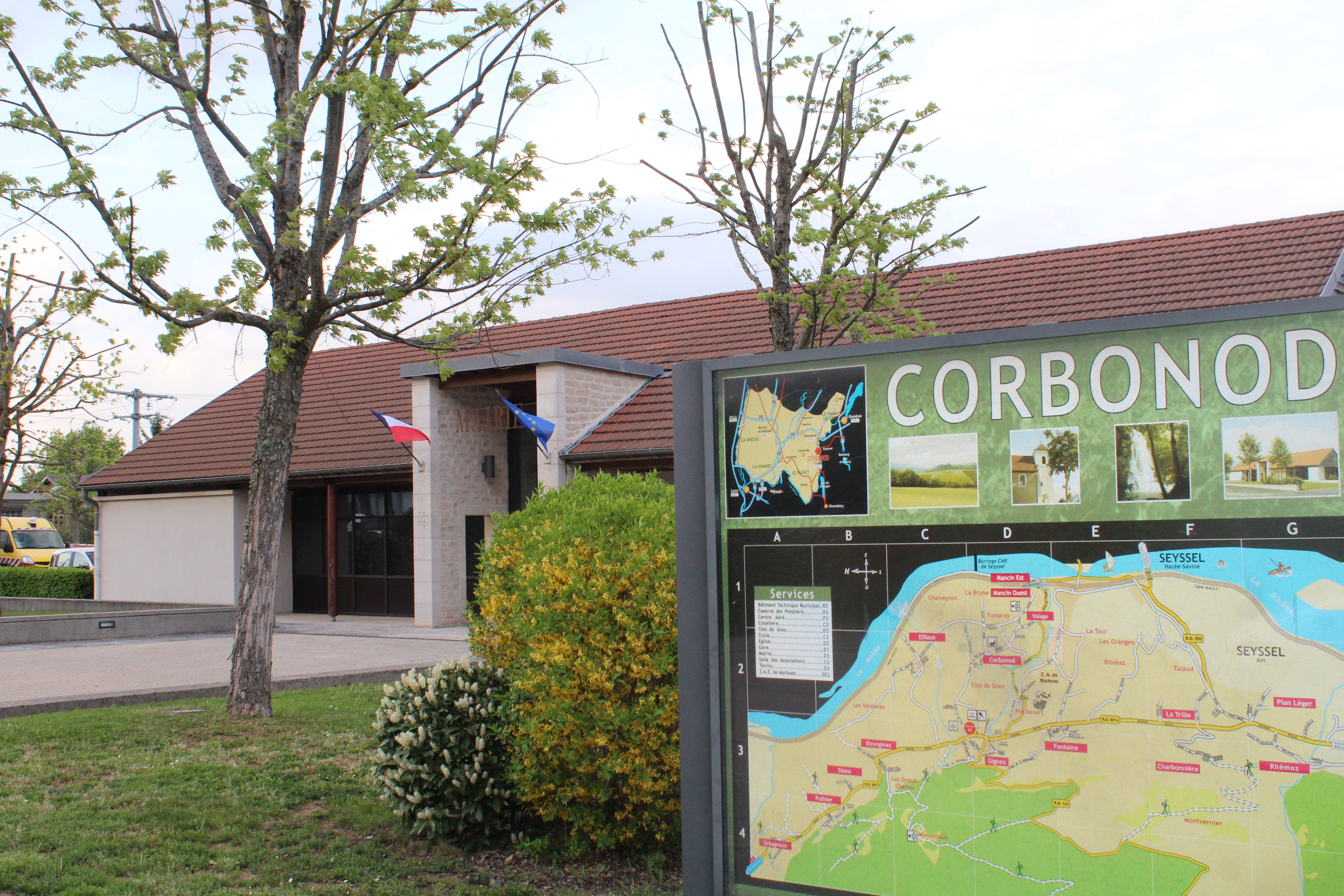 Mairie de Corbonod.